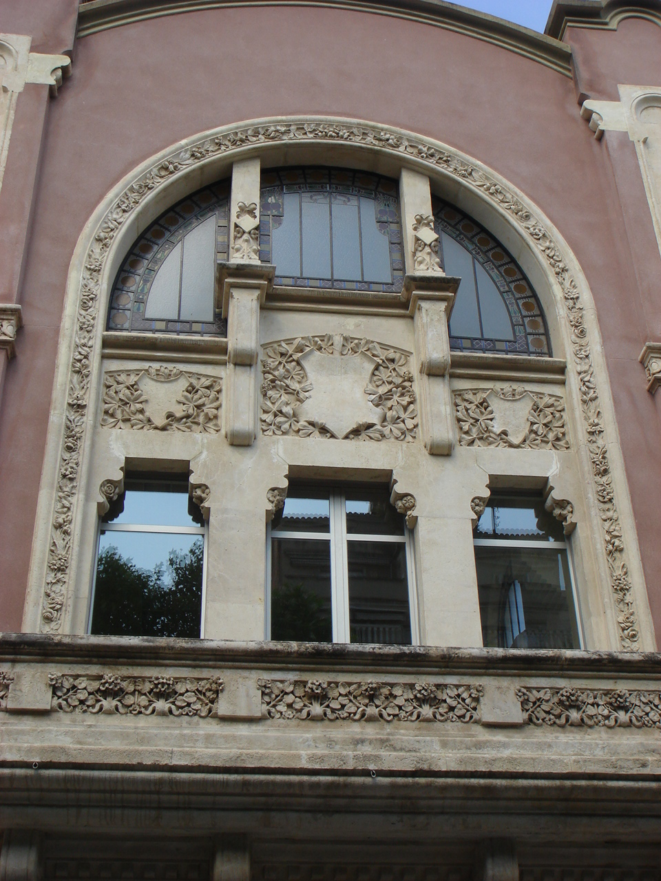 Detalle del casino de Manresa (España). Arquitectura modernista